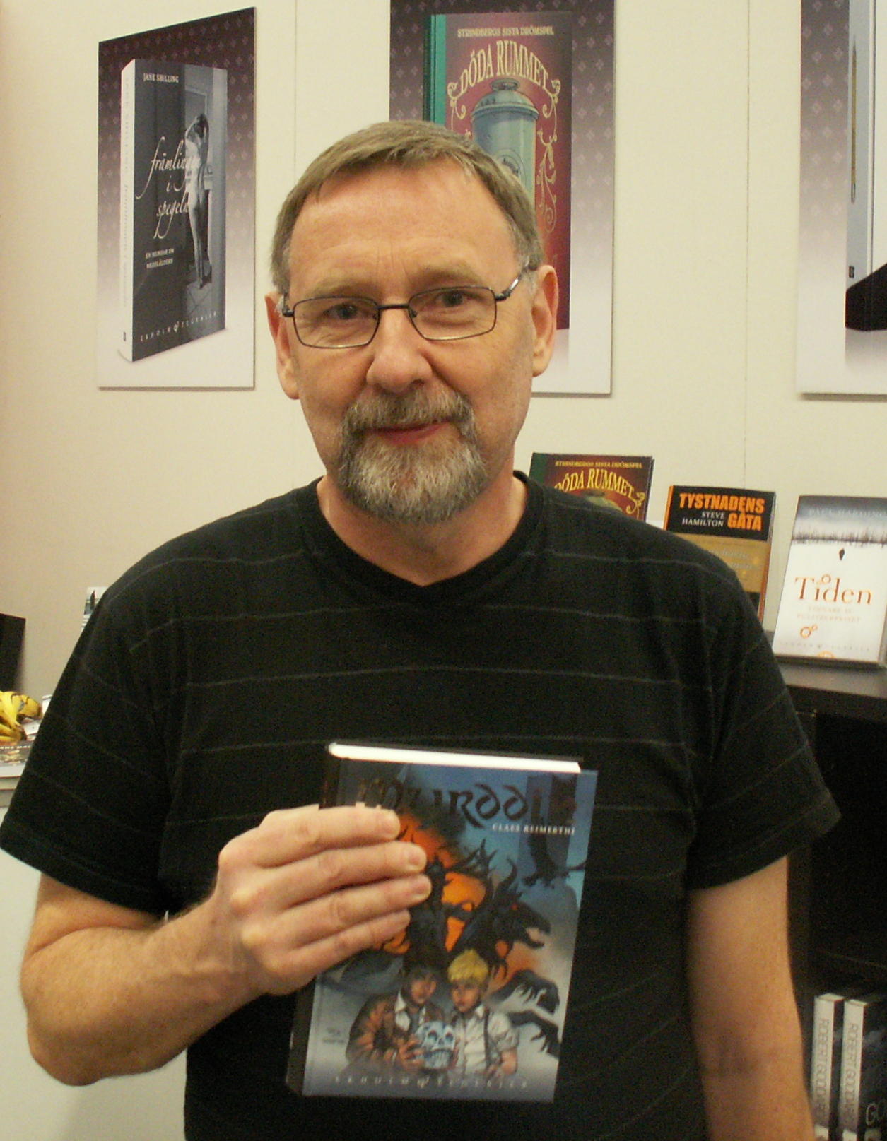 Claes Reimerthi, svensk författare av bland annat tecknade serier. Foto på Bok & Bibliotek-mässan 30 september 2012.